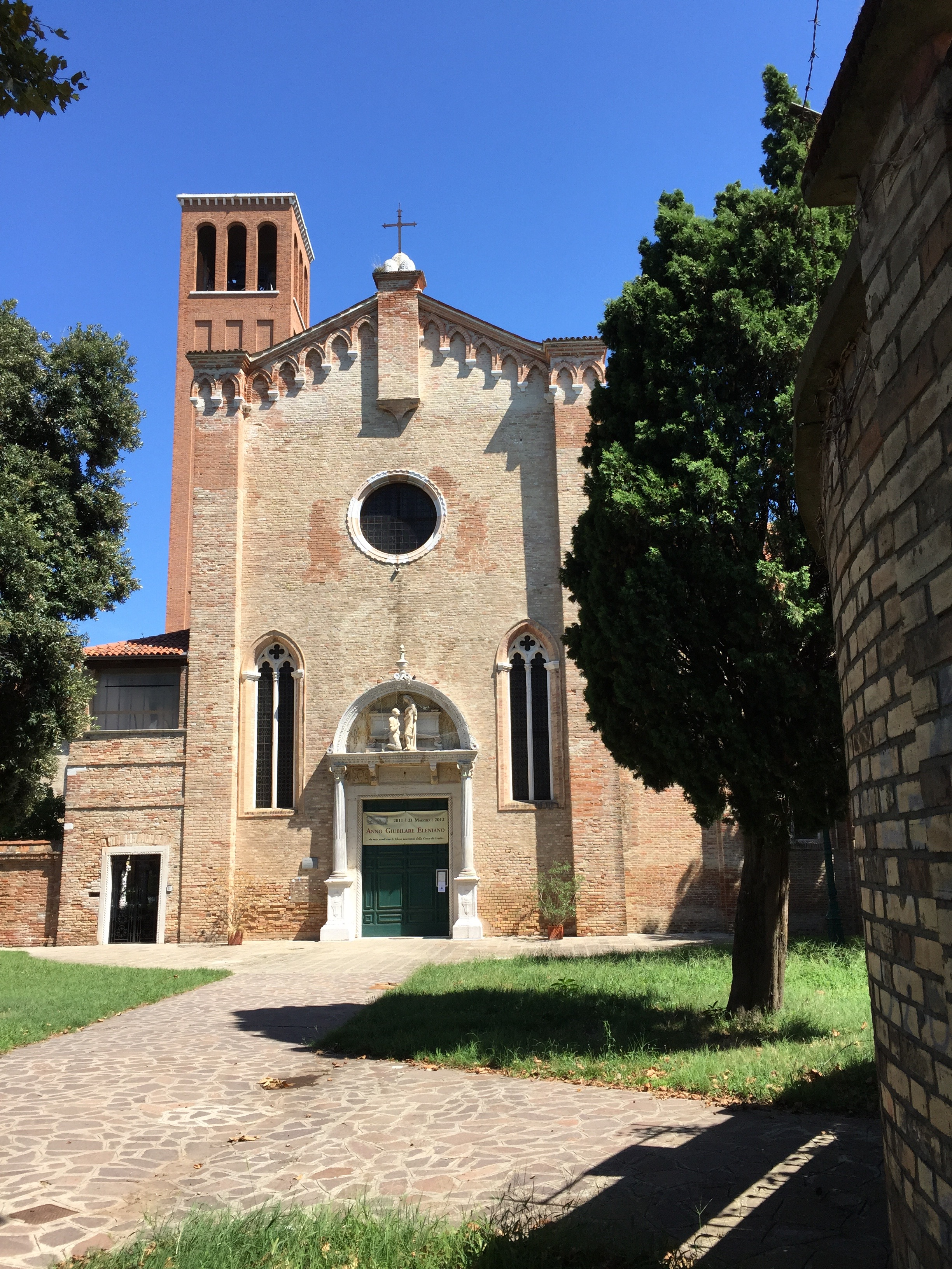 Template:Facciata della chiesa restaurata